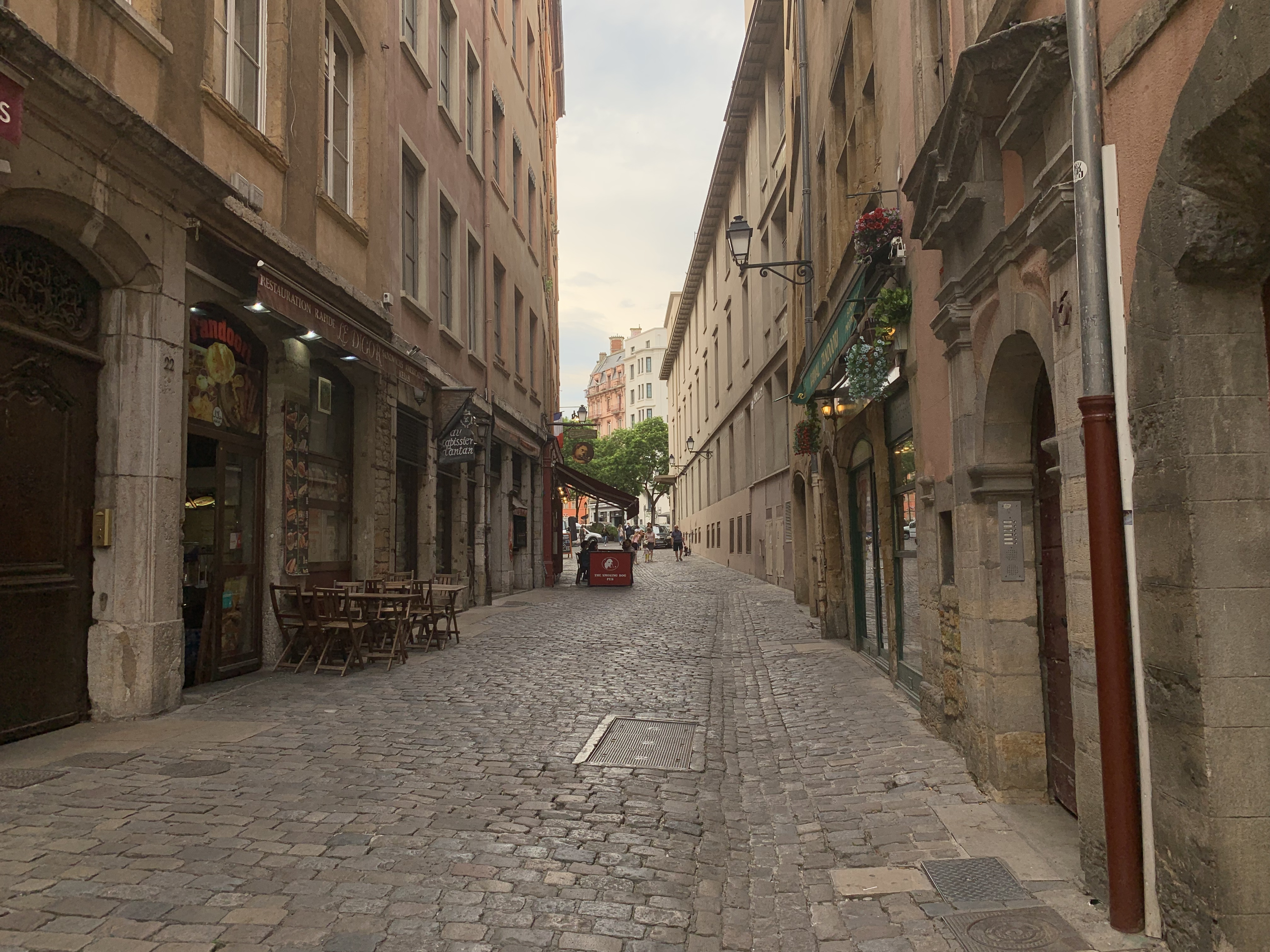 Rue Lainerie (Lyon), juin 2019.